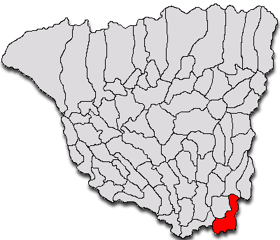 Categorie:Hărţi ale judeţului Gorj